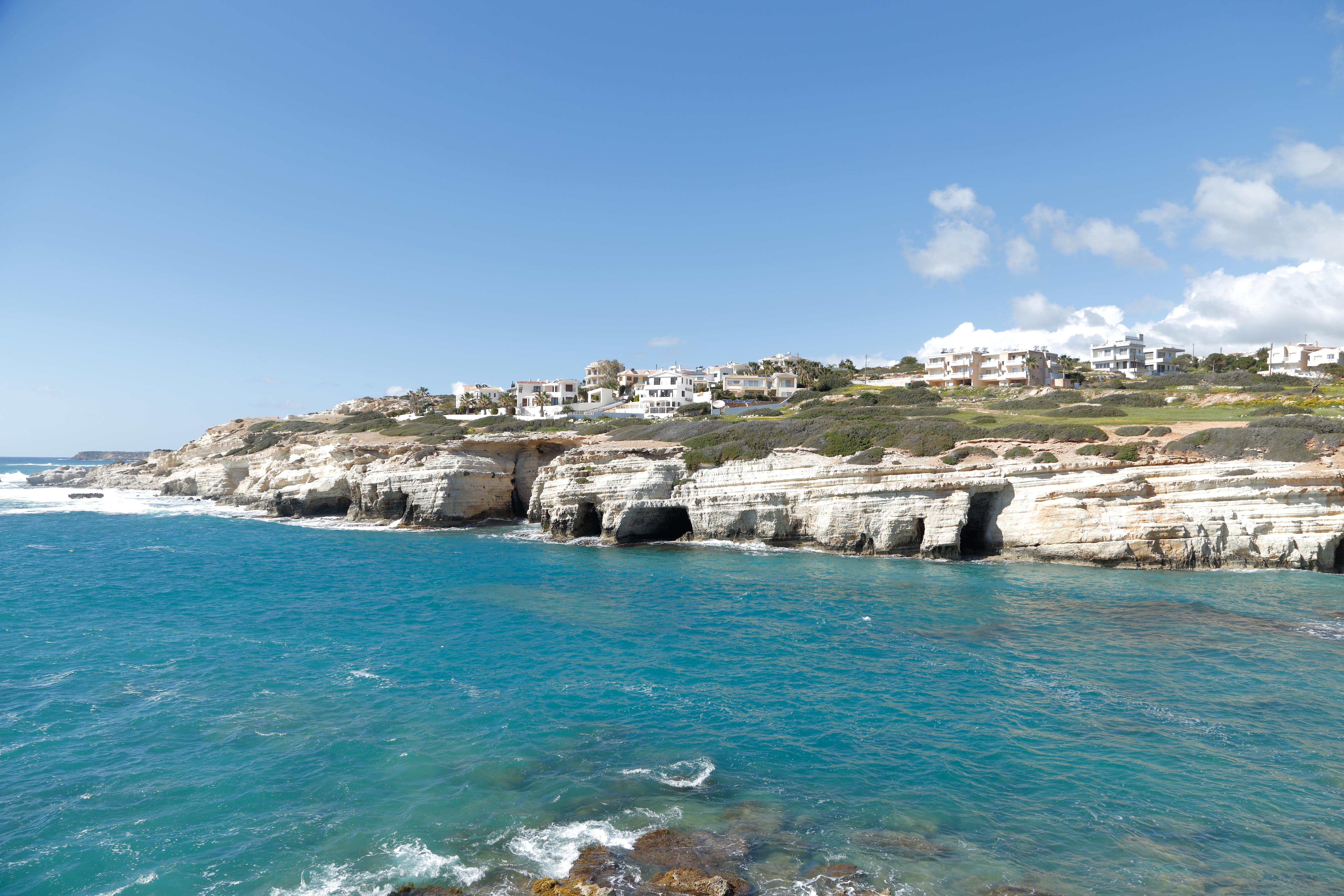 Sea Caves, Akamas Peninsula, Cyprus